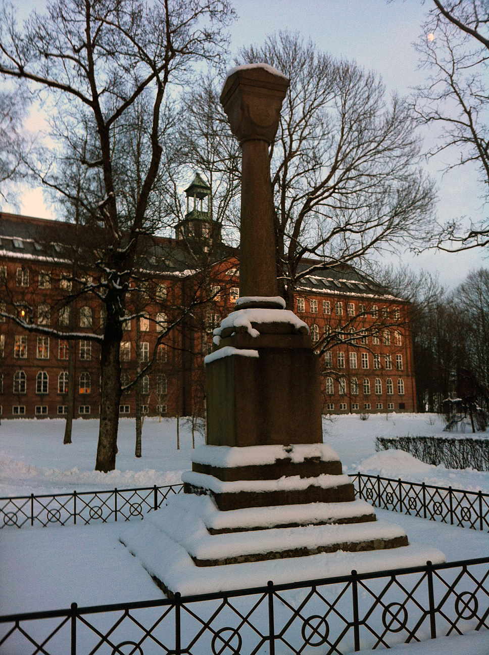 Falsenstøtta står i parken ved UMB vest for Tårnbygningen (i bakgrunnen). Tegnet av arkitekt A. T. W. von Hanno (1826 – 1882). Avdukingen foregikk i 1864, 50 år etter 1814, på Falsens fødselsdag den 14. september. Innskriften på steinen lyder: Til Minde om CHRISTIAN MAGNUS FALSEN og den Gjerning han paa dette Sted, hvor hans Arne engang stod, udførte for Fædrelandet.